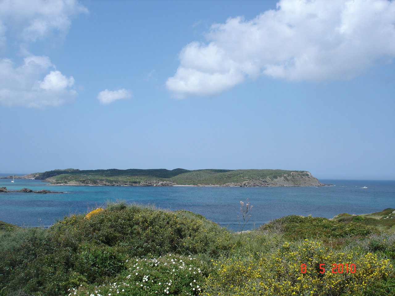 Vista de l'Illa d'en Colom, a la costa est de Menorca, des del poble d'Es Grau. L'Illa d'en Colom pertany al Parc Natural de S'Albufera des Grau.